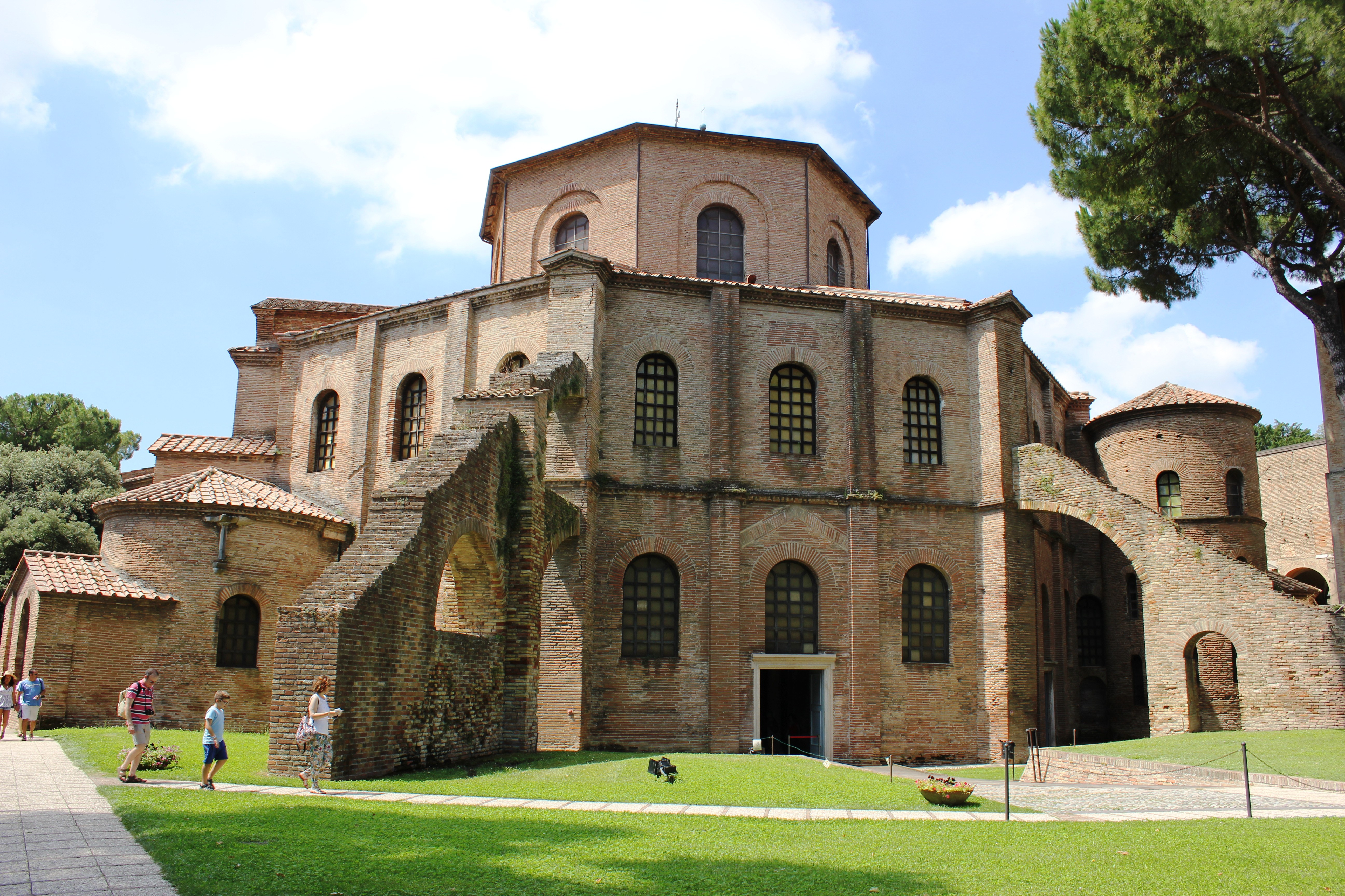 Базилика „Св. Виталий“ в Равена, Италия